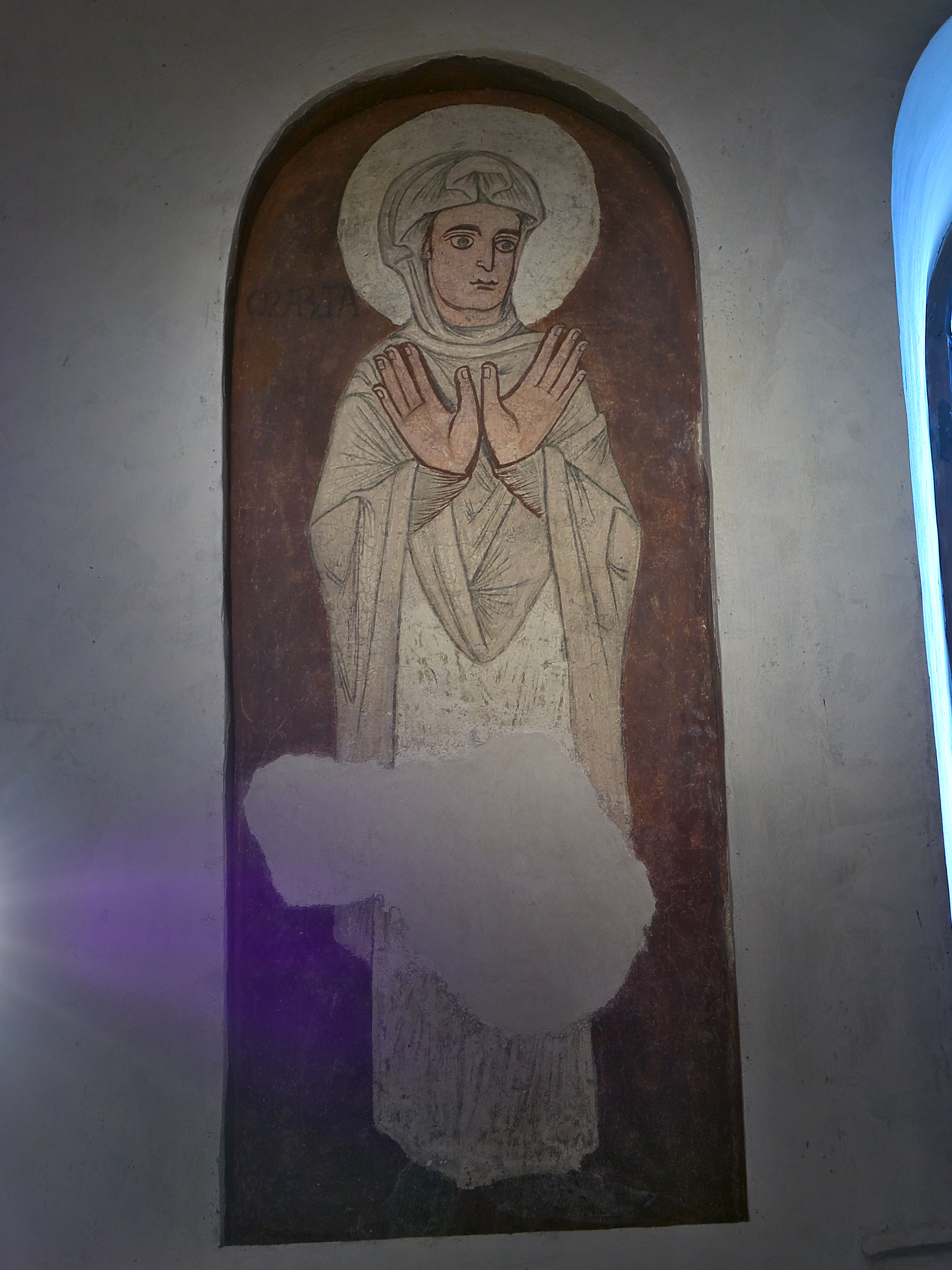 Pintura mural en el ábside de la Iglesia del Cristo de la Luz. Finales del XII o principios del XIII.